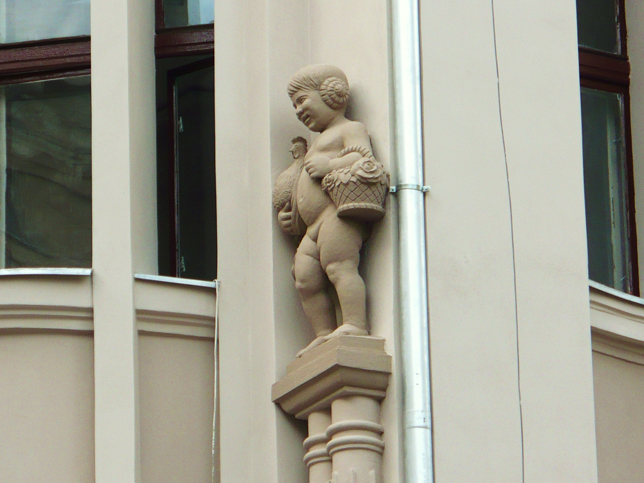 dom towarowy, 1910-1911 Bydgoszcz, ul. Gdańska 15